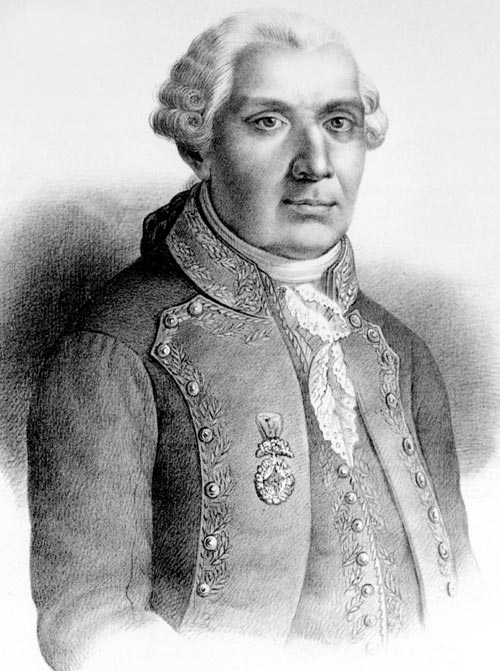 Mateo de Toro Zambrano y Ureta (o de Toro y Zambrano, como se escribe en muchos registros históricos) (Santiago de Chile, 20 de septiembre de 1727 - † 26 de febrero de 1811), Vizconde previo de la Descubierta, I conde de la Conquista, caballero de la Orden de Santiago, Gobernador de Chile 1810-1811, militar criollo chileno y presidente de la primera Junta de Gobierno de Chile.